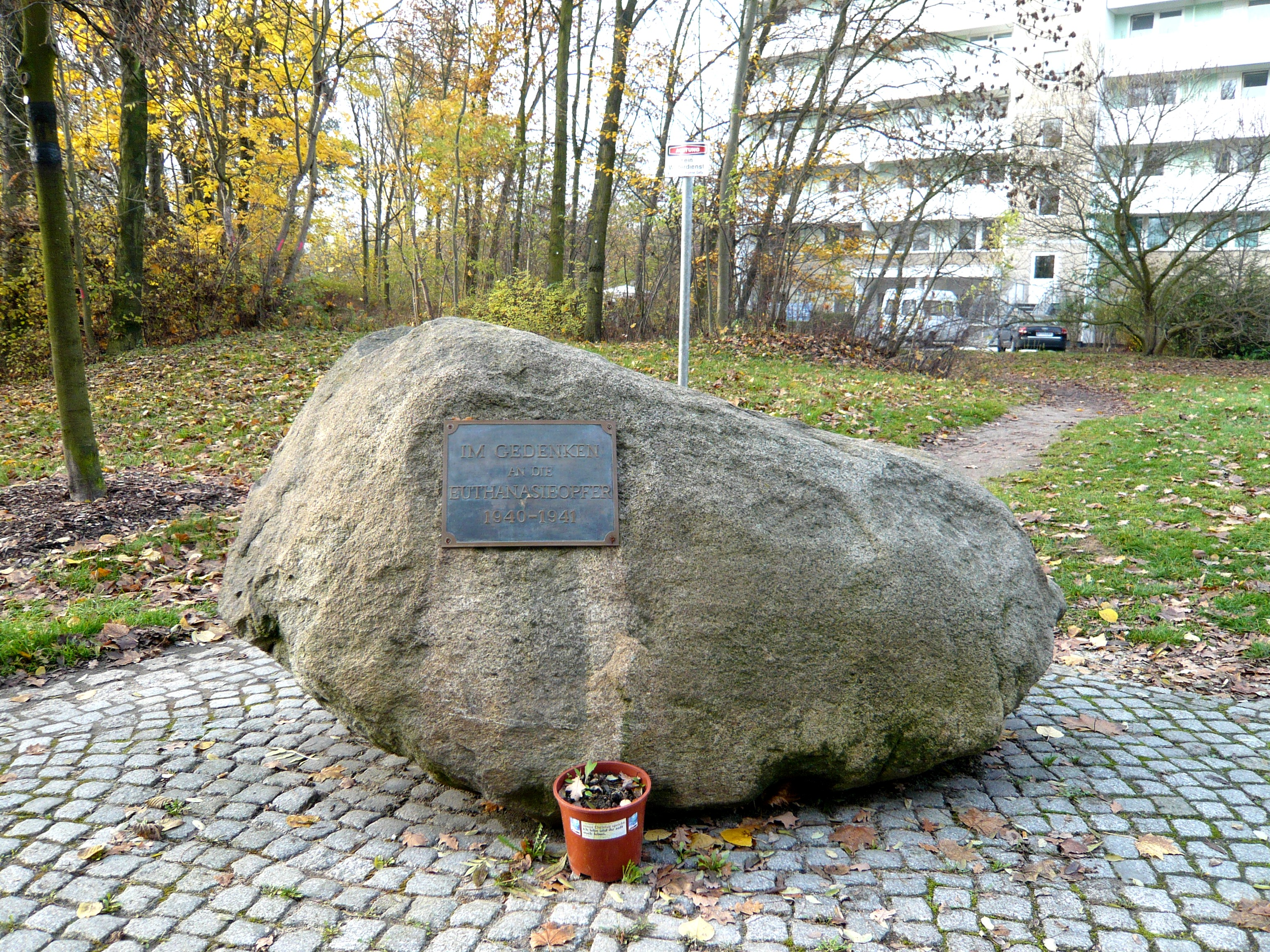 Wilhelm-Griesinger-Krankenhaus, Berlin, Gedenkstein für die Euthanasie-Opfer